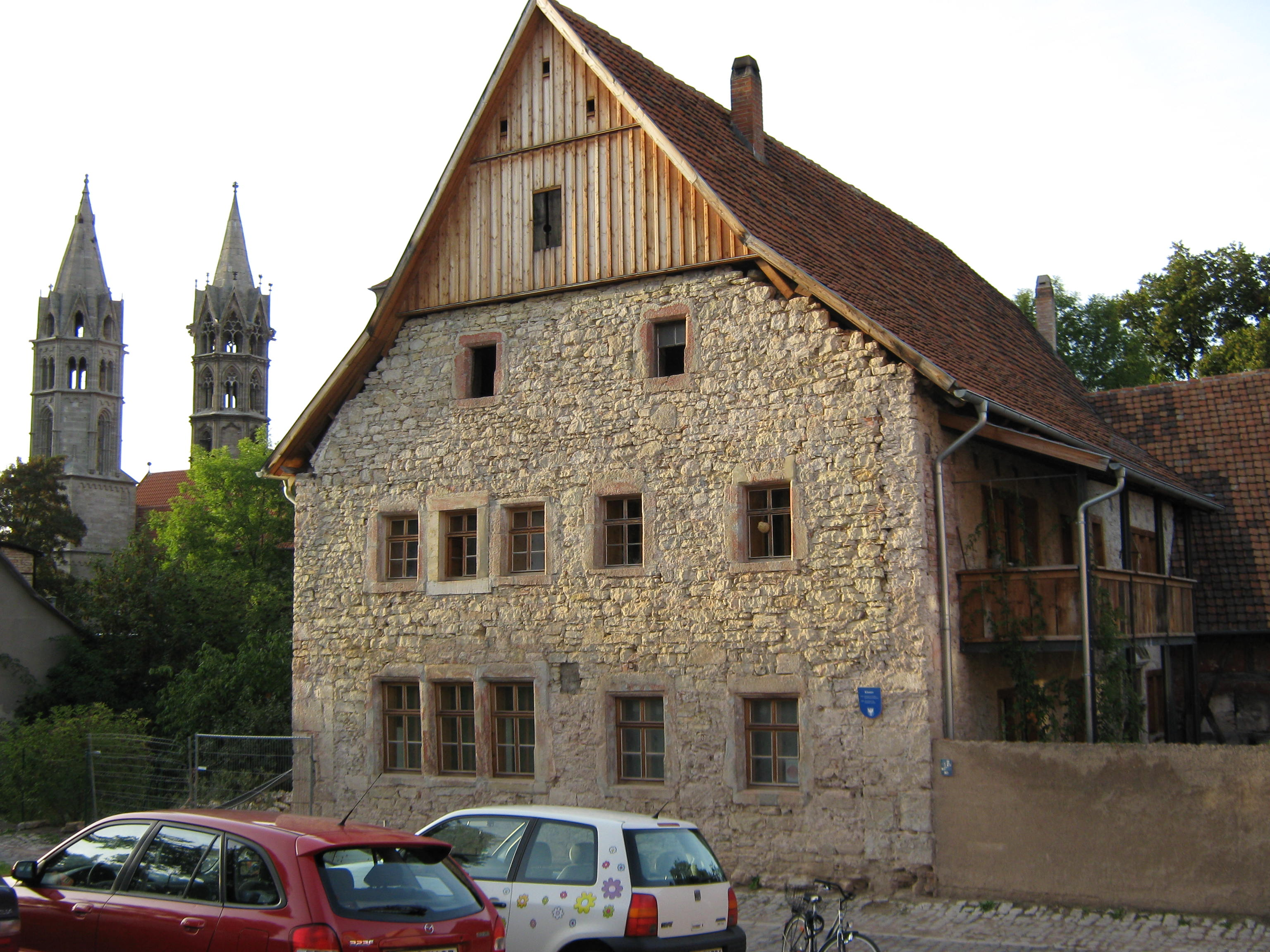 Ehemaliges Oberkloster der Benediktinerinnen in Arnstadt von 1521, nach der Reformation Wohnhaus.